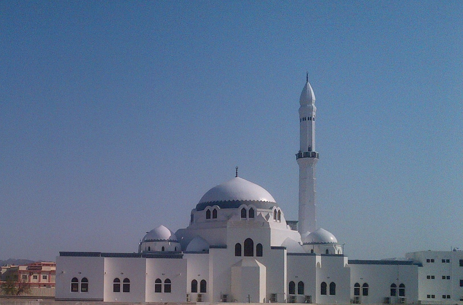 Di wilayah ini, Nabi Muhammad bersama para sahabatnya kaum Muhajirin salat jum'at pertama kalinya di Kota Madinah, sekarang wilayah tersebut dibangun Masjid yang dinamakan dengan Masjid Jum'ah